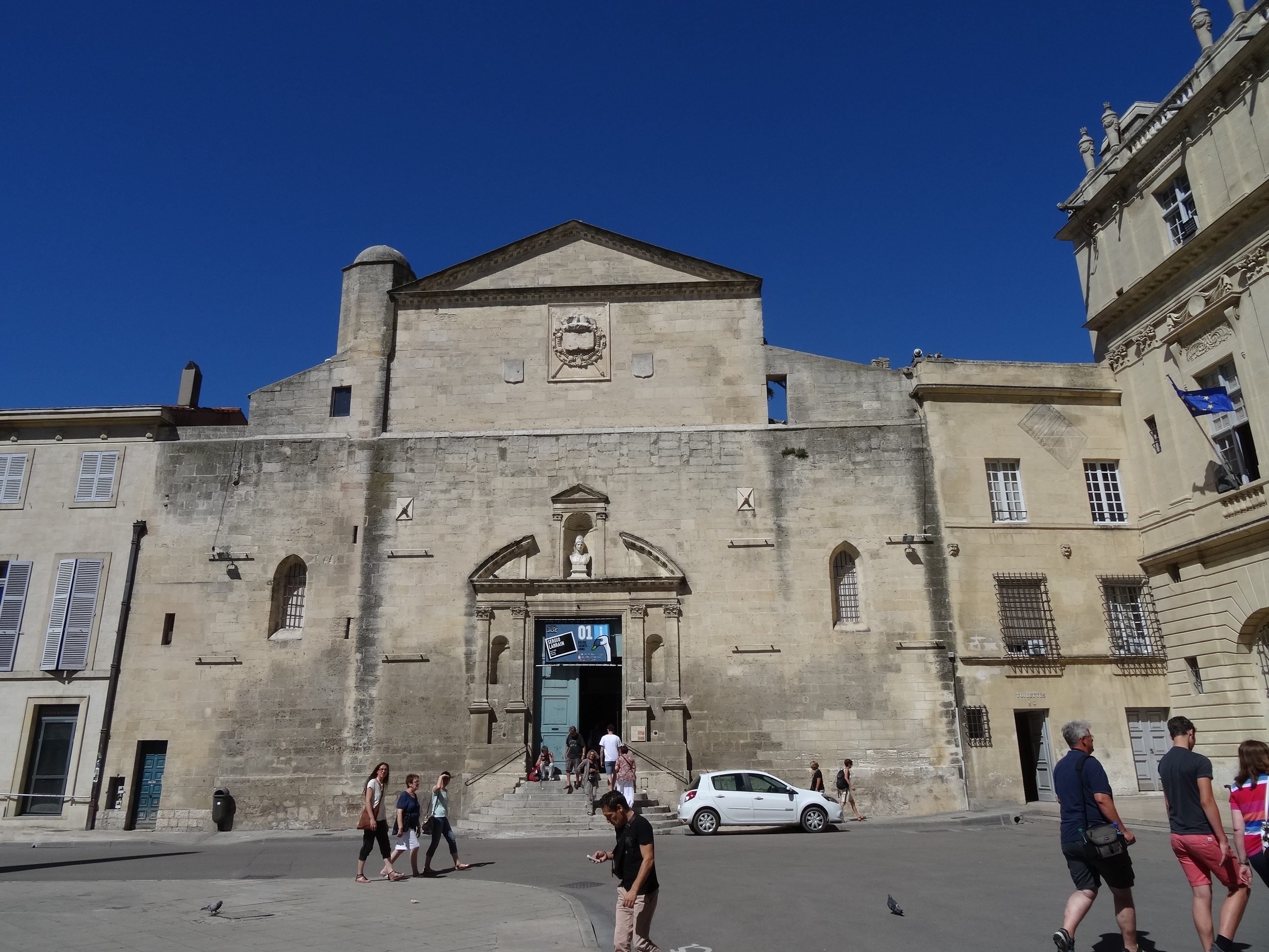 Église Sainte-Anne (Classé) .